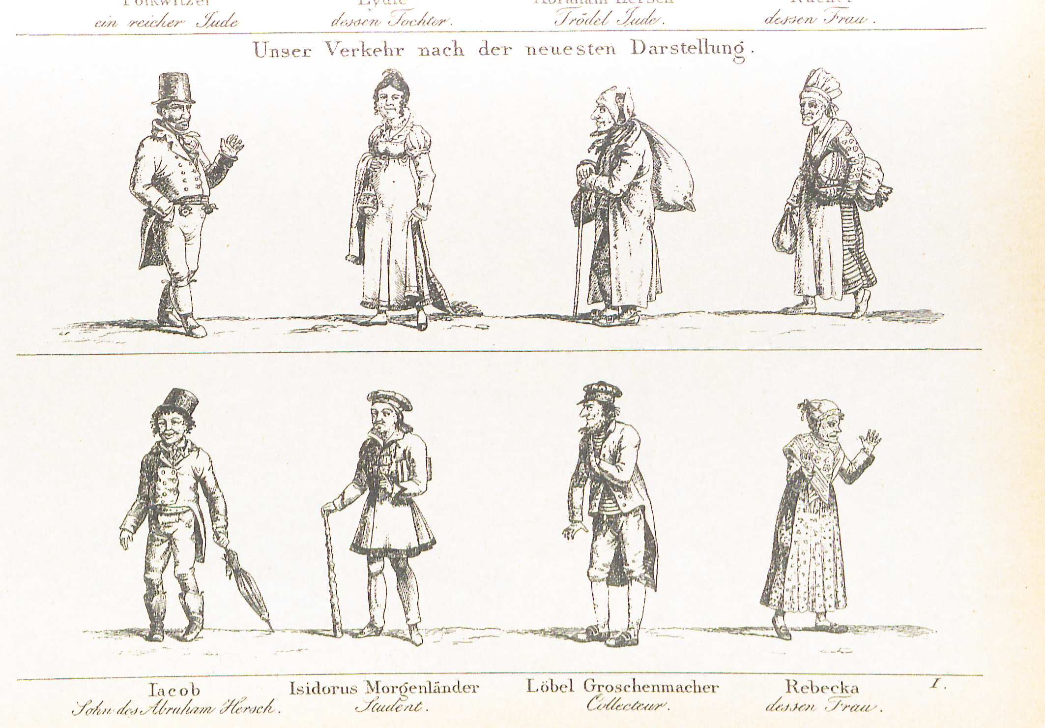 Unser Verkehr nach der neuesten Darstellung. Nürnberger Bilderbogen um 1825. Die Figuren der Handlung. . Bei Eduard Fuchs ohne genaueren Nachweis. Unser Verkehr ist eine Posse von Karl Borromäus Alexander Sessa, die seit 1815 erfolgreich in deutschen Theatern gespielt wurde. Ihr Inhalt bedient antisemitische Vorurteile